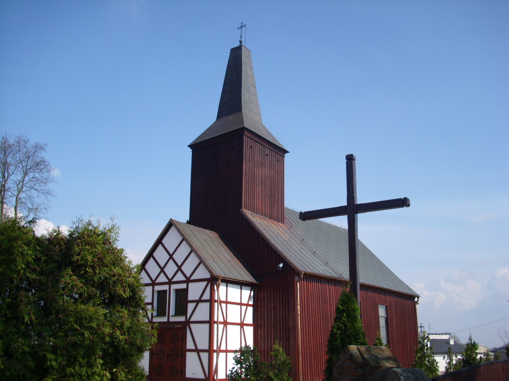 Kościół parafialny Nawiedzenia NMP w Jastrzębiu